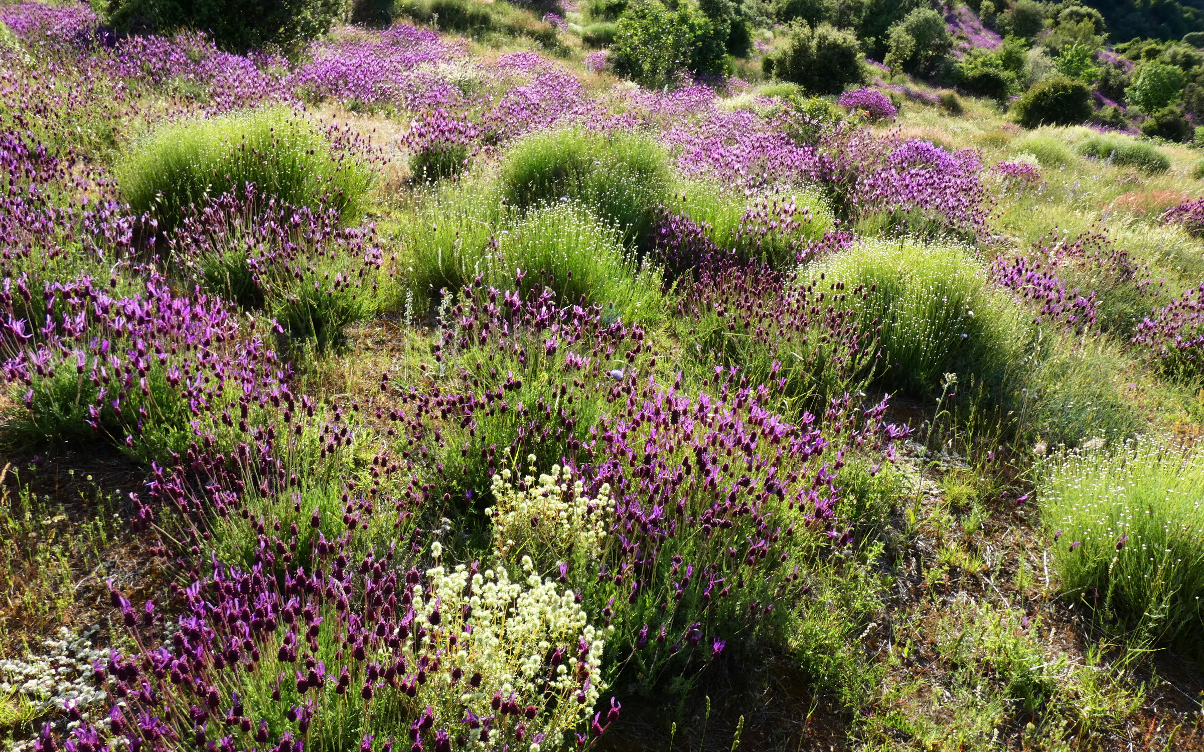 El arbusto de flores moradas se llama por aquí cantueso (Lavandula stoechas)